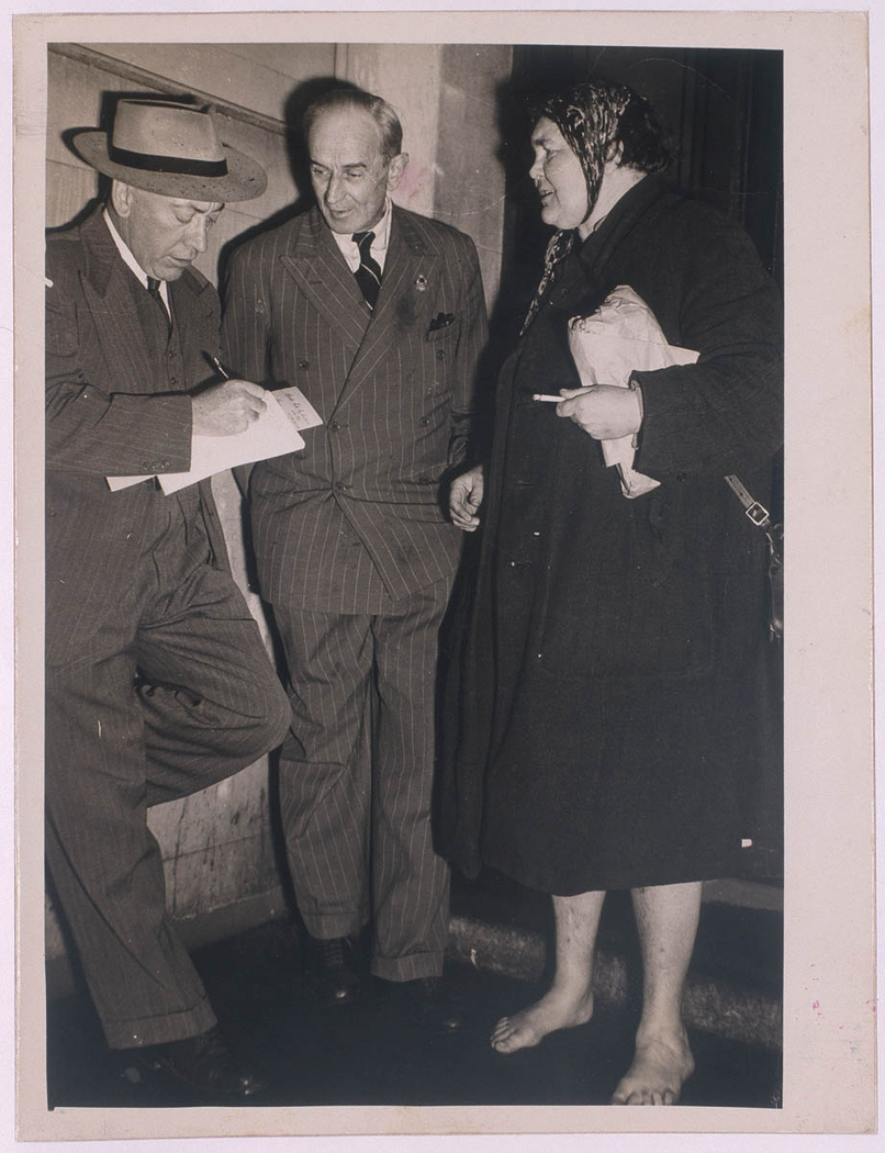 Bea Miles (1902–1973)